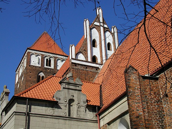 Bazylika św. Tomasza Apostoła